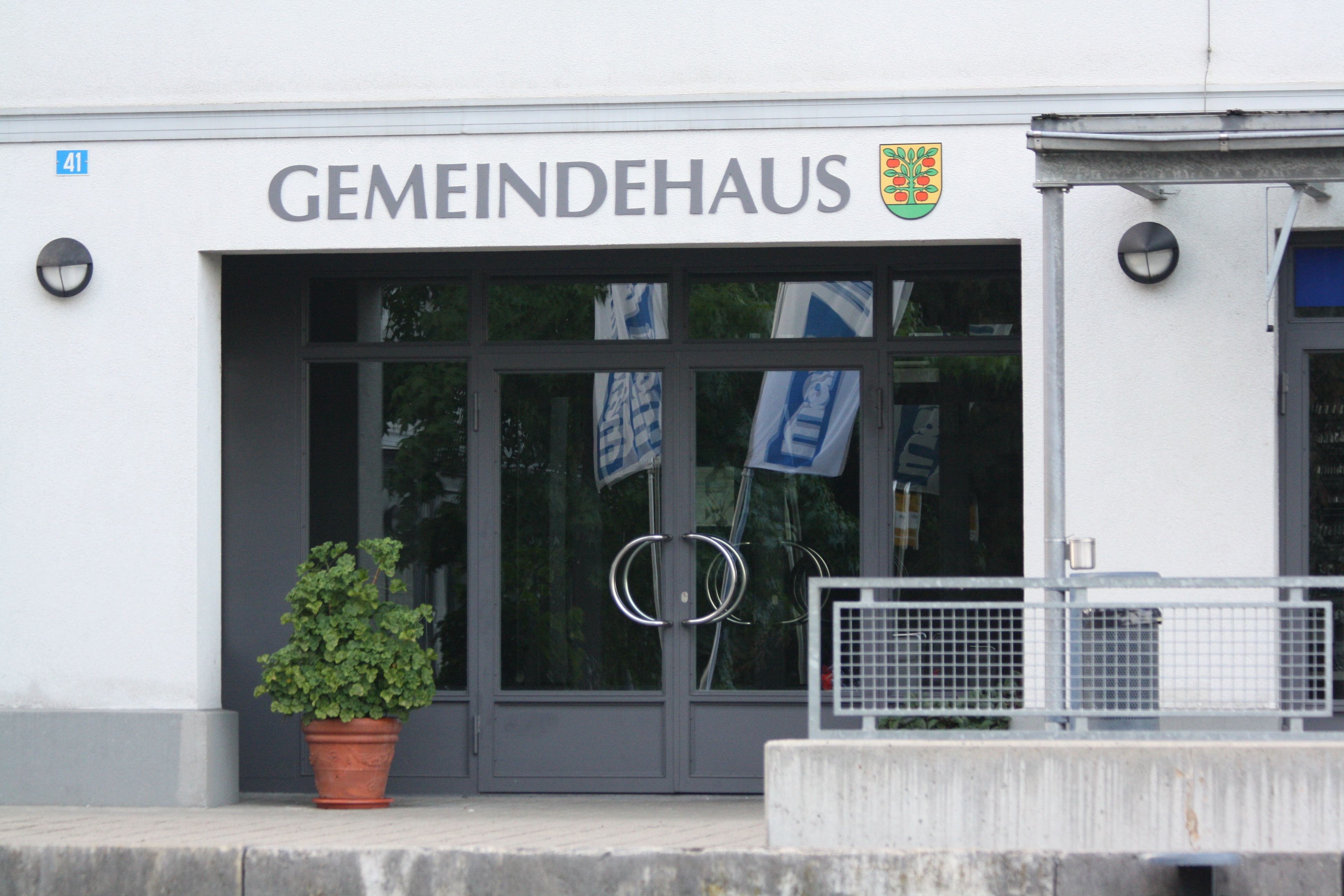 Gemeindehaus von Grossaffoltern